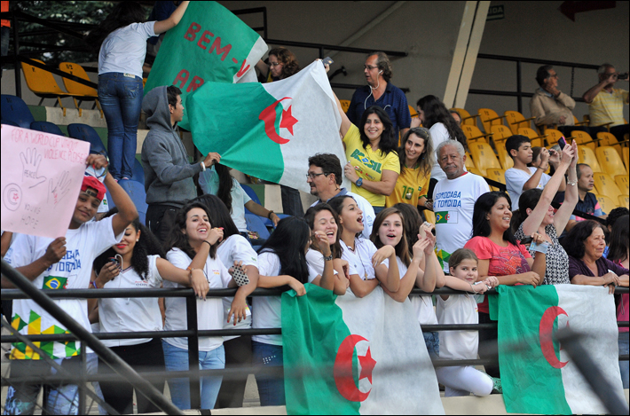 The Greens find fans in the stands even in Brazil. وجد الخضر جماهيرهم بانتظارهم على المدرجات حتى في البرازيل. Les Verts trouvent des supporters dans les gradins, même au Brésil.